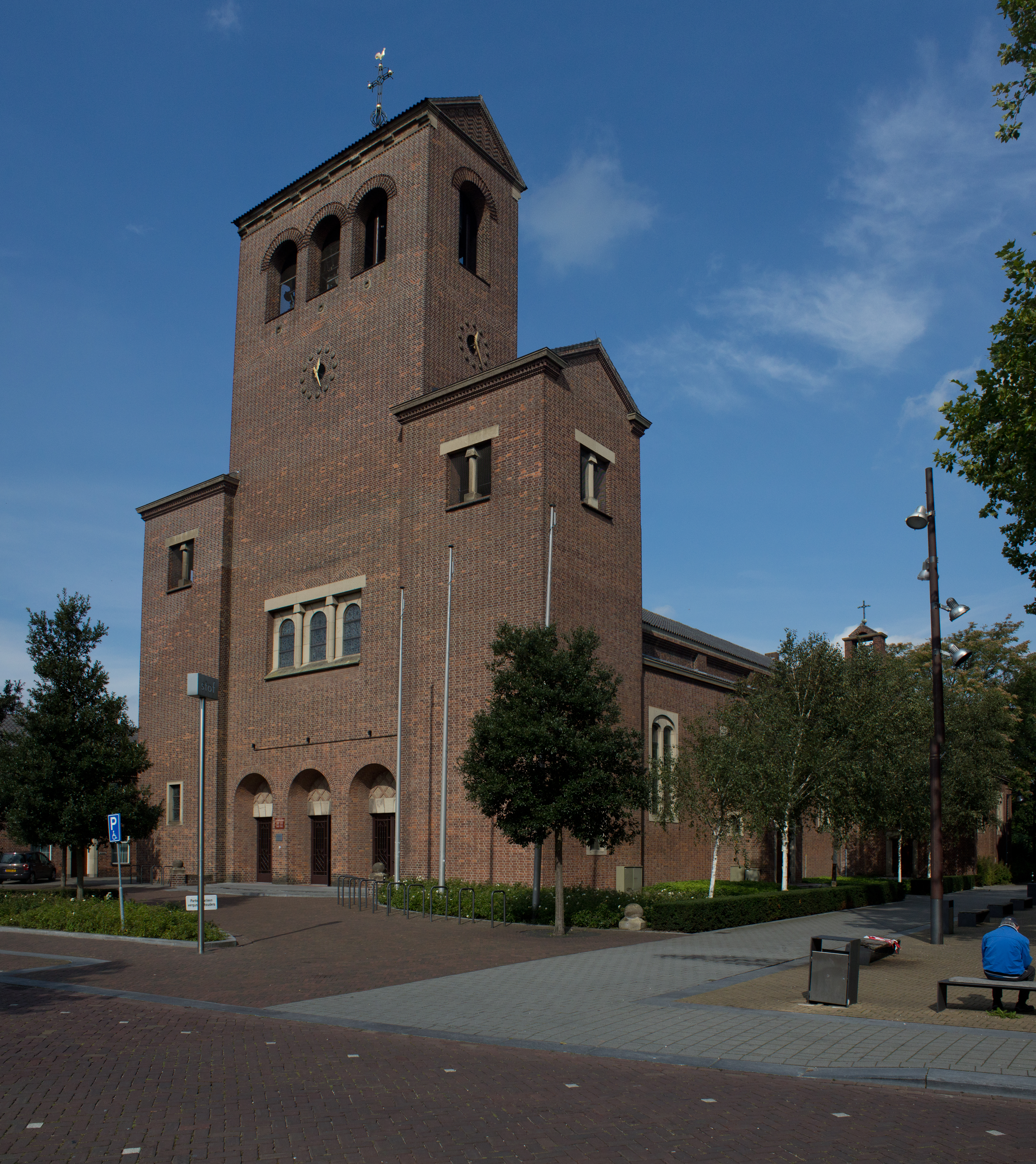 Zicht op de Sint-Lambertuskerk te Drunen.